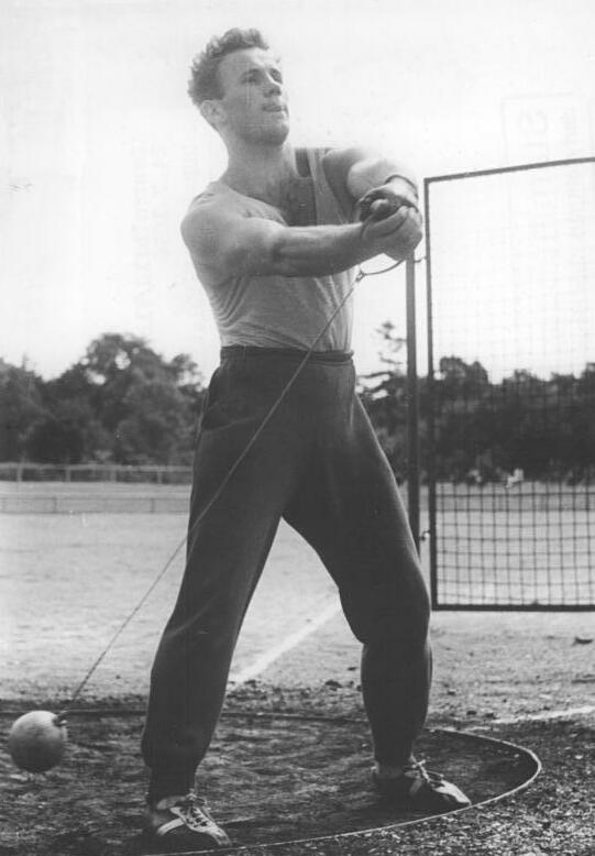 Siegfried Perleberg Zentralbild Wlocka 24.7.1956 DDR-Leichtathletik-Meisterschaften in Erfurt In der Zeit vom 20. bis zum 22. Juli 1956 wurden im Erfurter Georg-Dimitroff-Stadion die VII. Leichtathletik-Meisterschaften der DDR ausgetragen. UBz: Mit einer Weite von 52,51 m siegte Siegfried Perleberg (Traktor Schwerin) im Hammerwerfen.